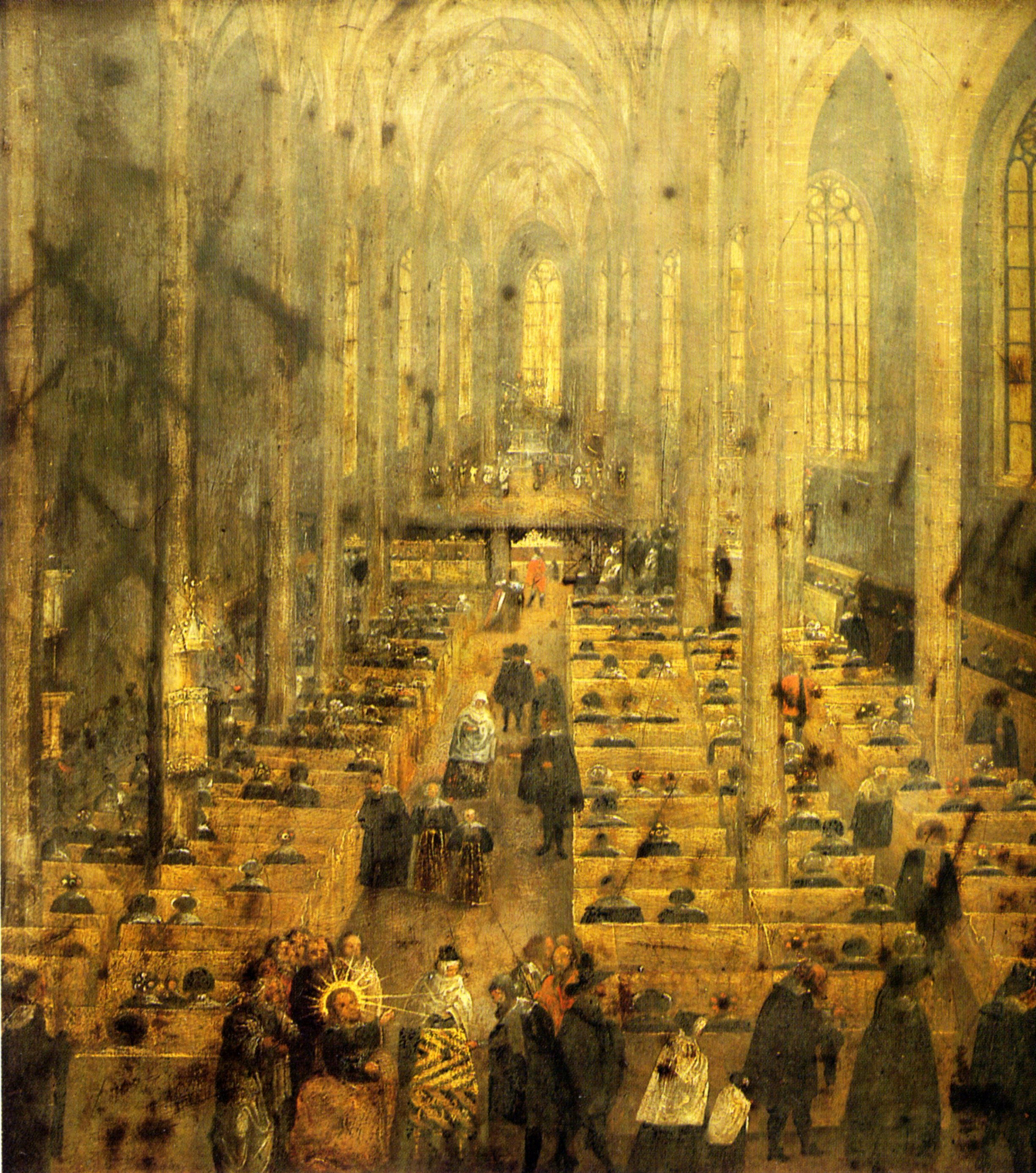 Inneres des Bautzener Petridoms. Öl auf Kupfer, 58x51,5 cm. Museum Bautzen, Inv.Nr. R 7765. In: Stadtmuseum Bautzen, Bildführer, hrsg. von der Sächsischen Landesstelle für Museumswesen, Bautzen 1994, S. 62